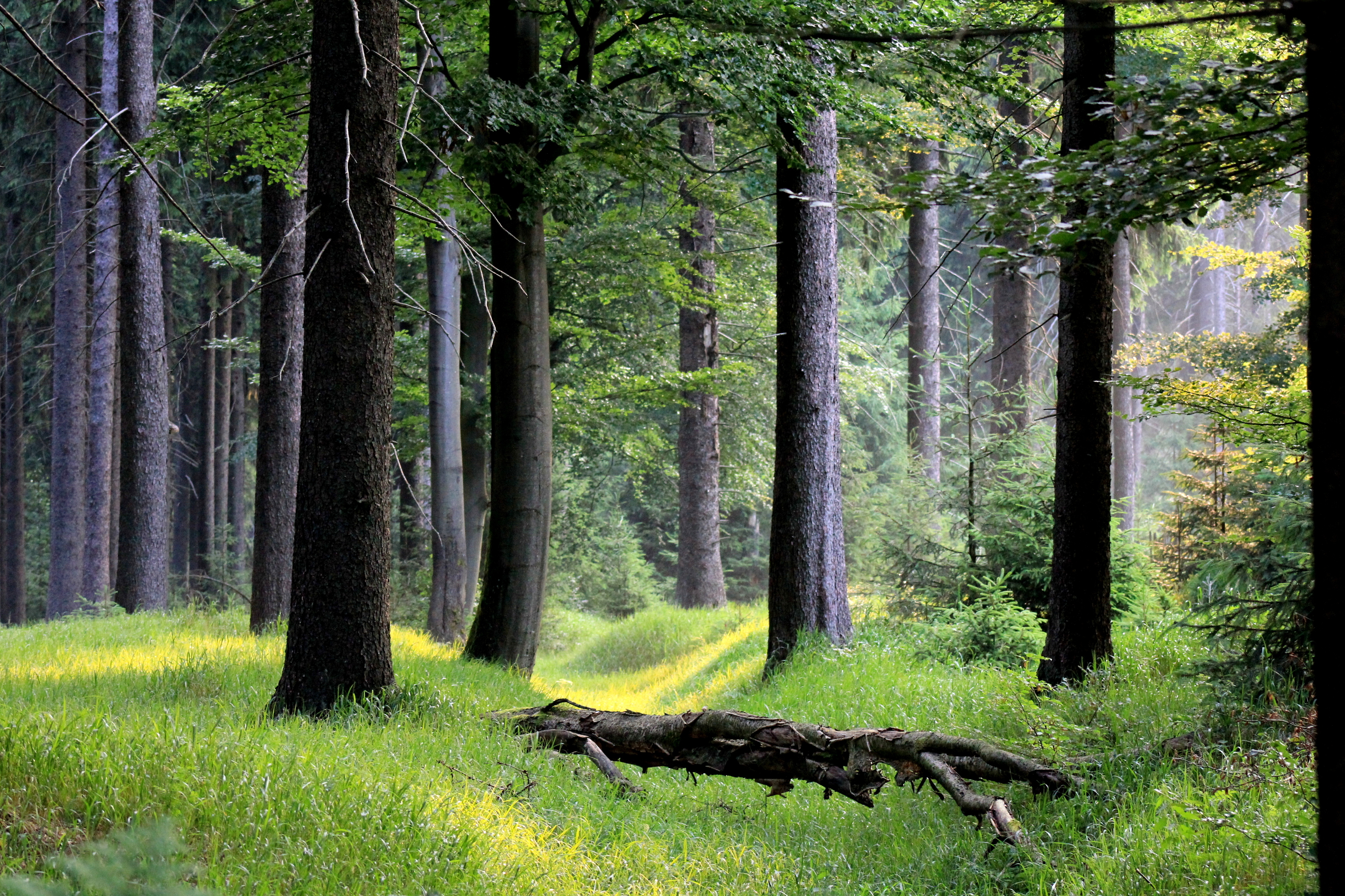 Blick in den Wald bei Friedrichshöhe (Westliches Thüringer Schiefergebirge)